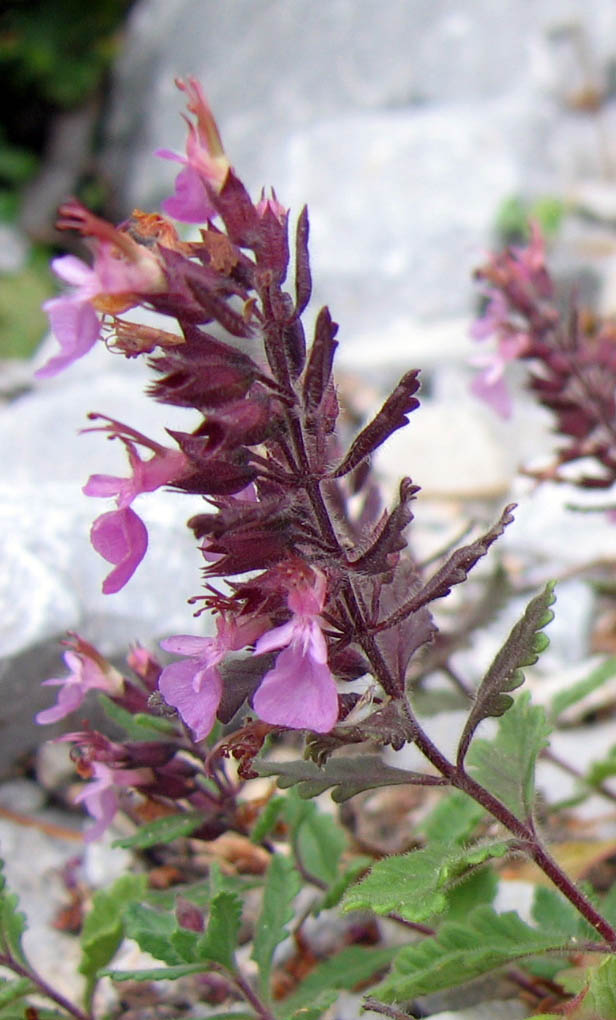 Podubica iz Biogradske gore